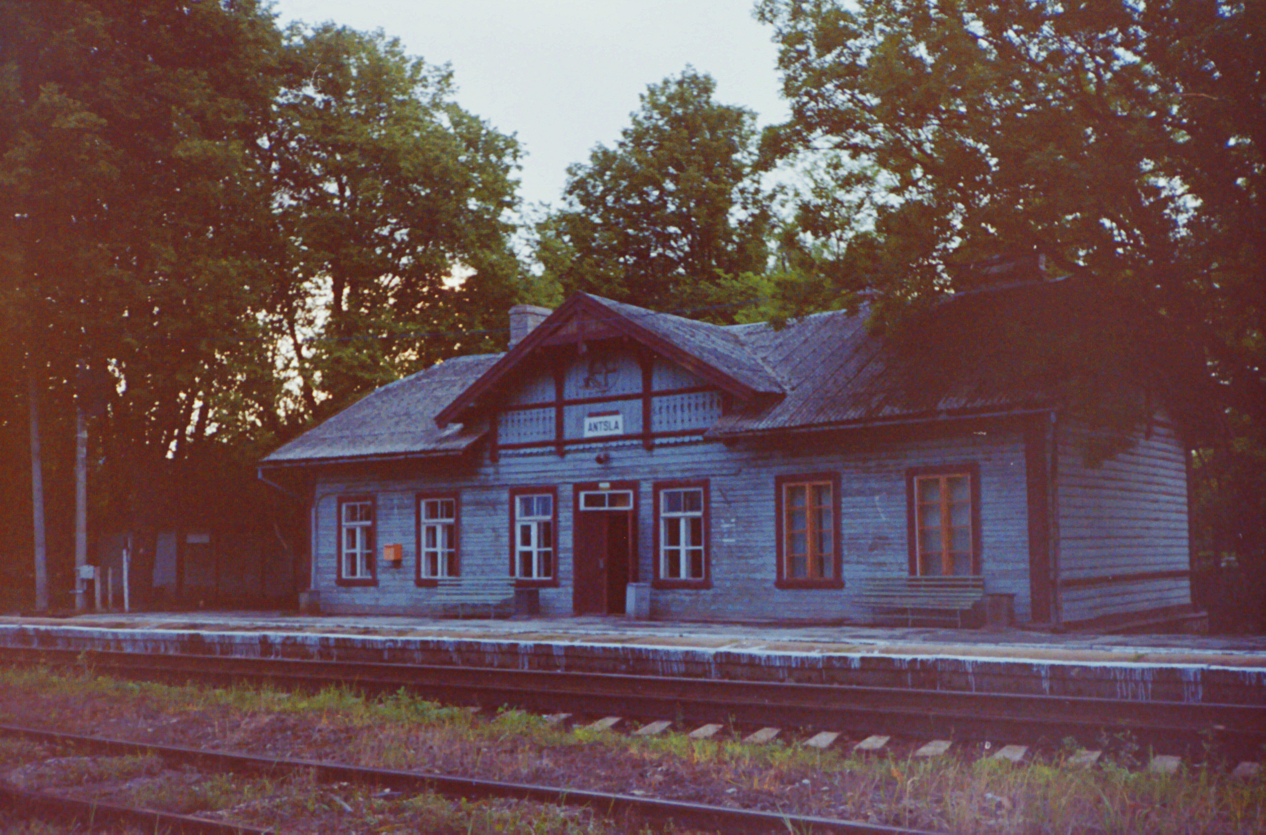 Antsla raudteejaam